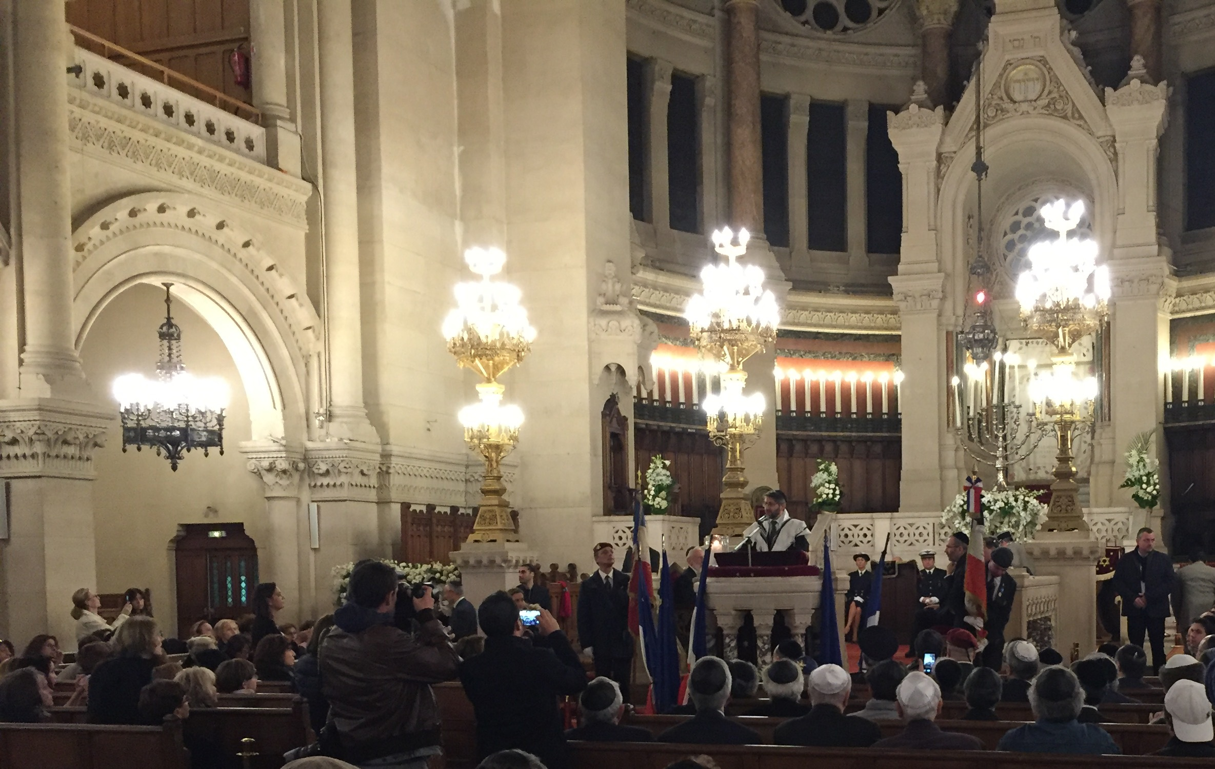 Haim Korsia, grand rabbin de France pendant son allocution